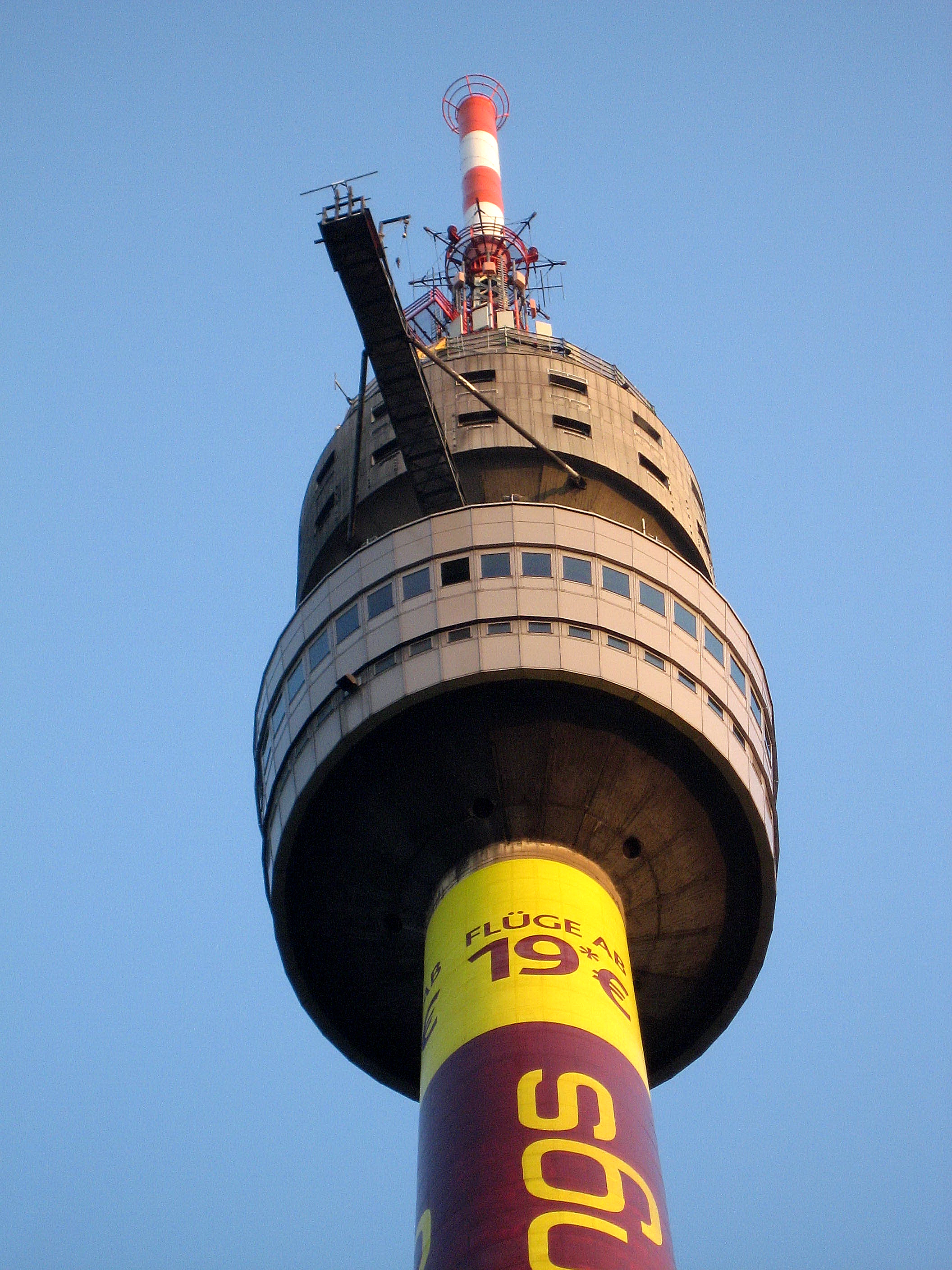 Westfalenpark Dortmund, Florianturm, Kopf mit Bungee-Platform